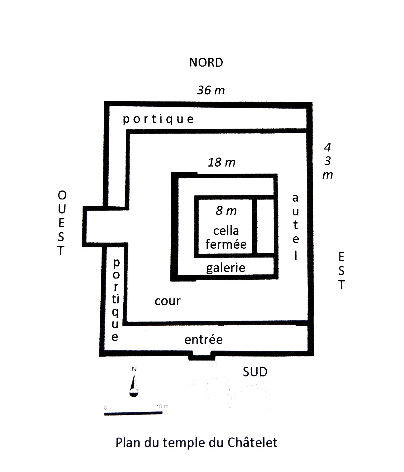 Andance Chatelet temple plan